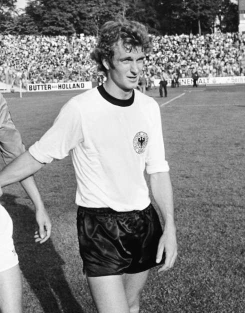 Rainer Bonhof tijdens de vriendschappelijke interland West-Duitsland - Nederland (1-1) op 17 mei 1975